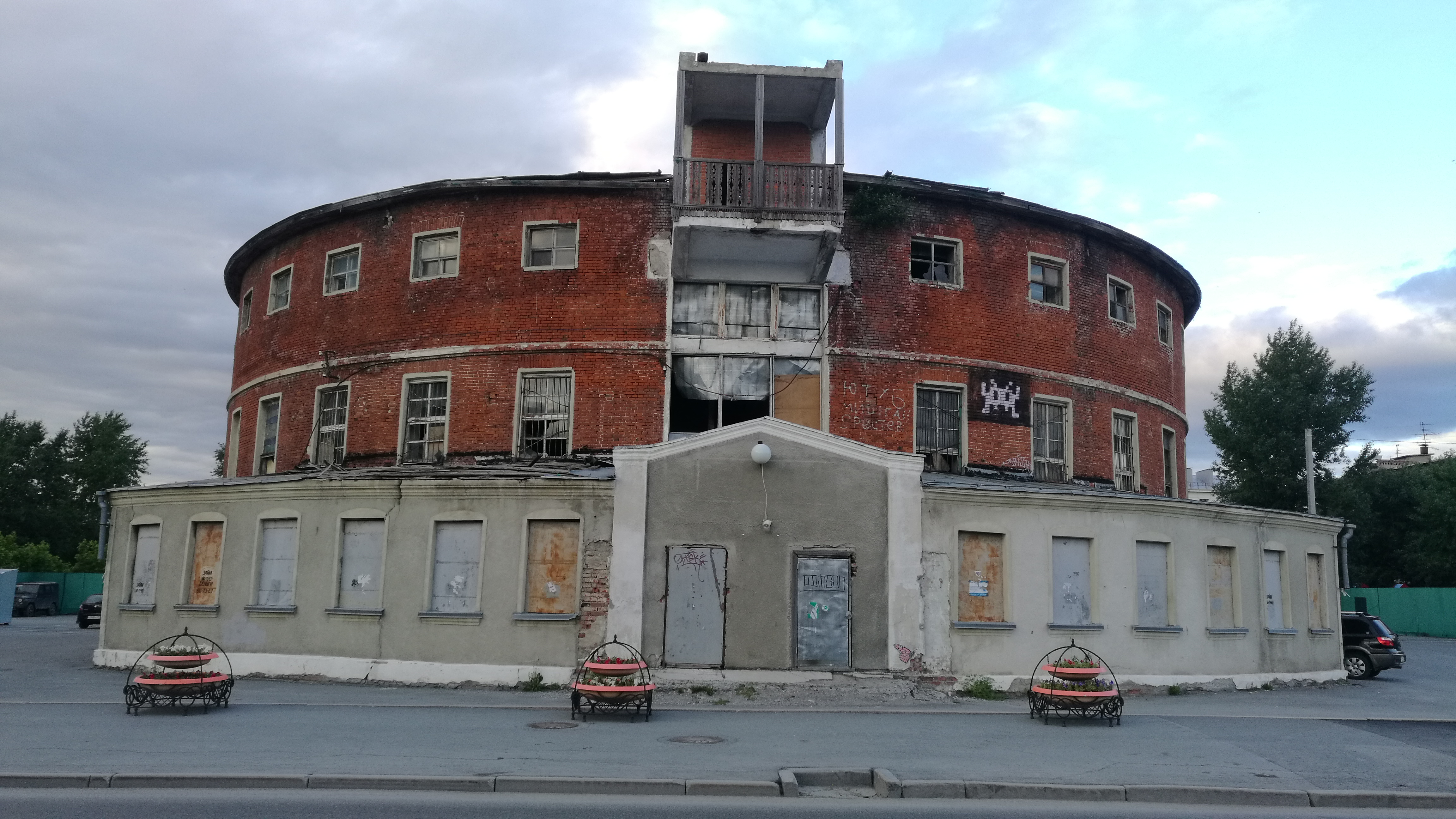 Ronda banejo. Tjumeno, Rusio.